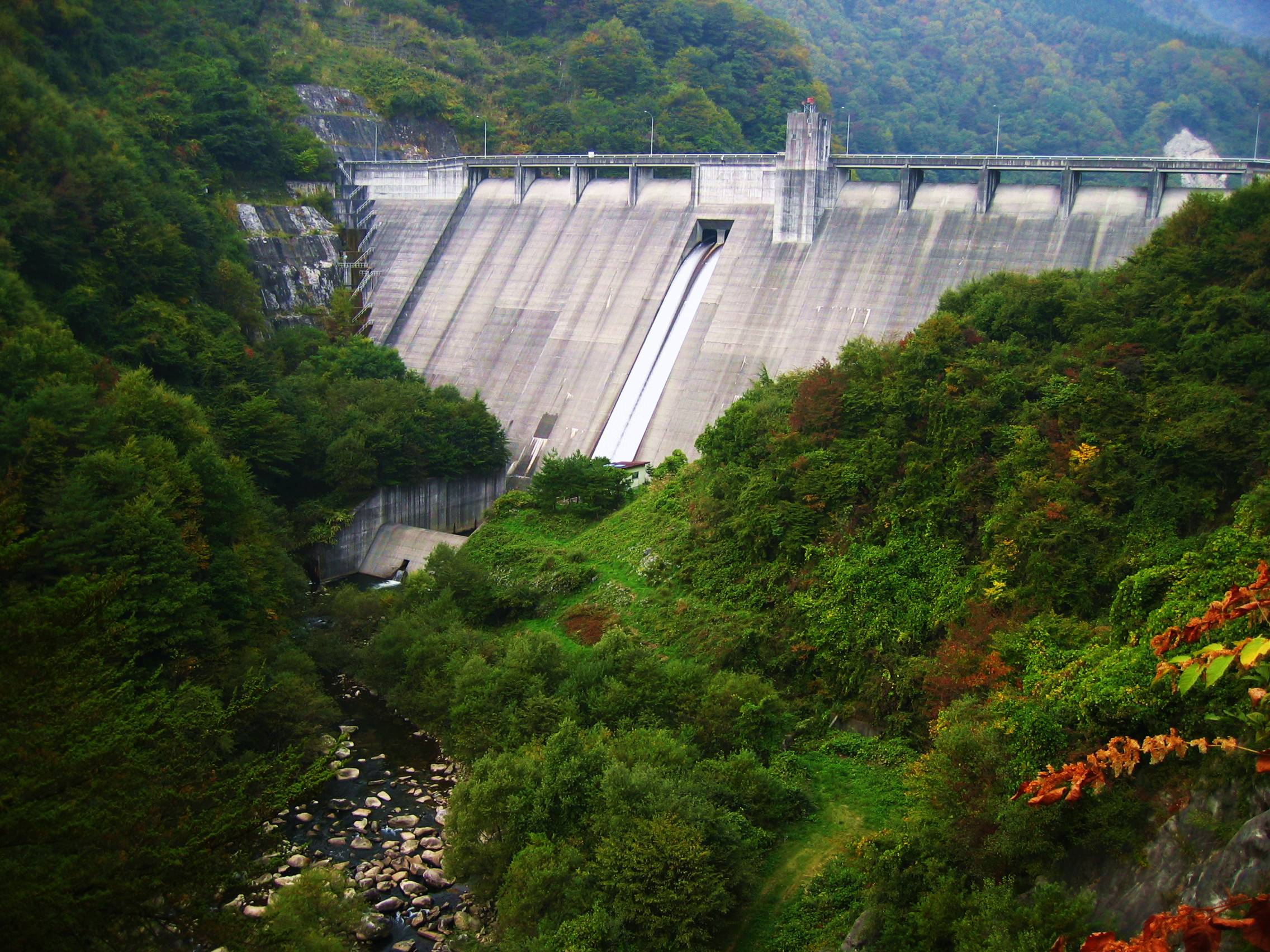 Katagiri Dam (片桐ダム) is a dam in Matsukawa town, Nagano prefecture, Japan.